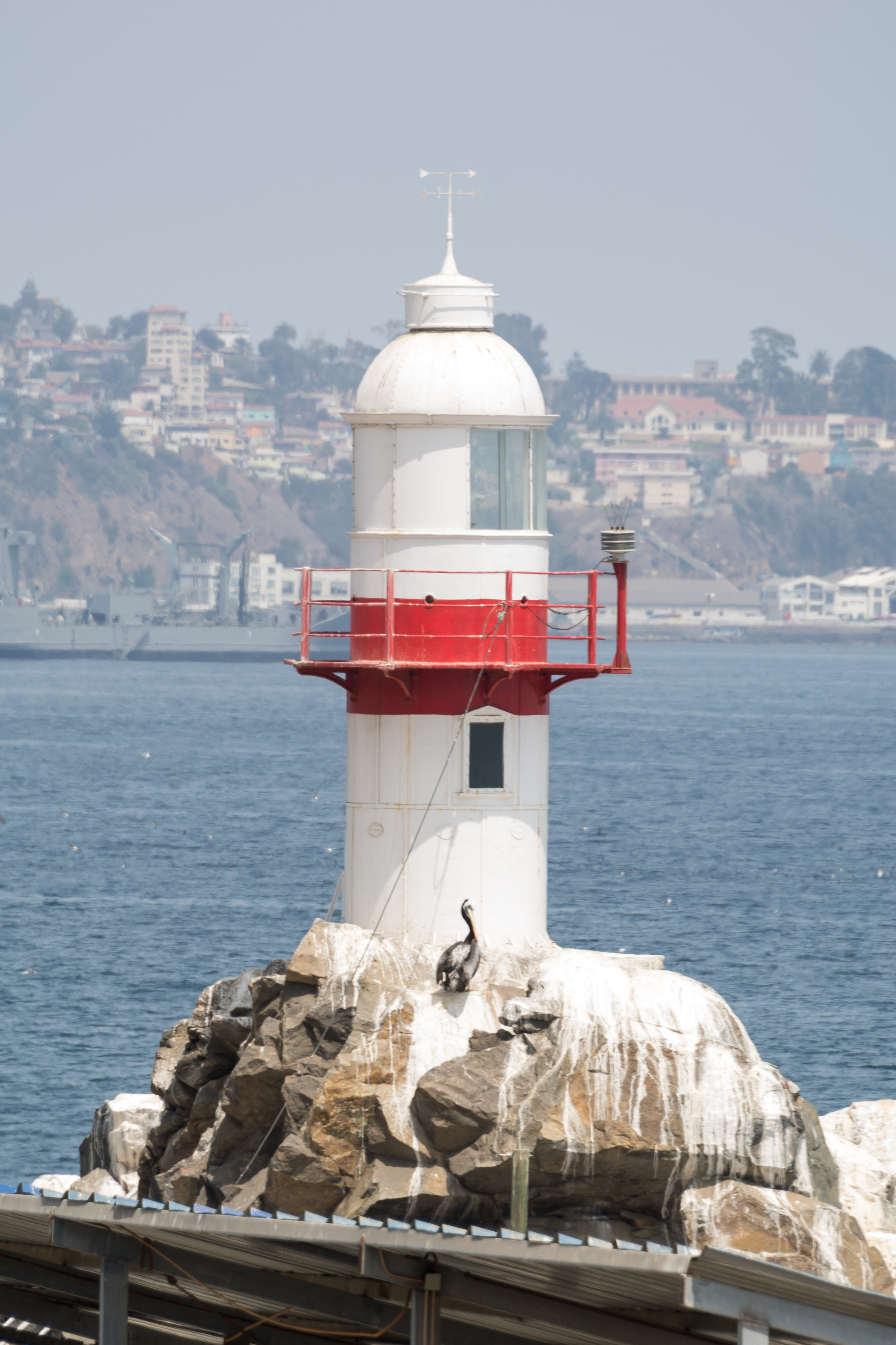 Faro Punta Condell, Viña del Mar, Región de Valparaíso, Chile